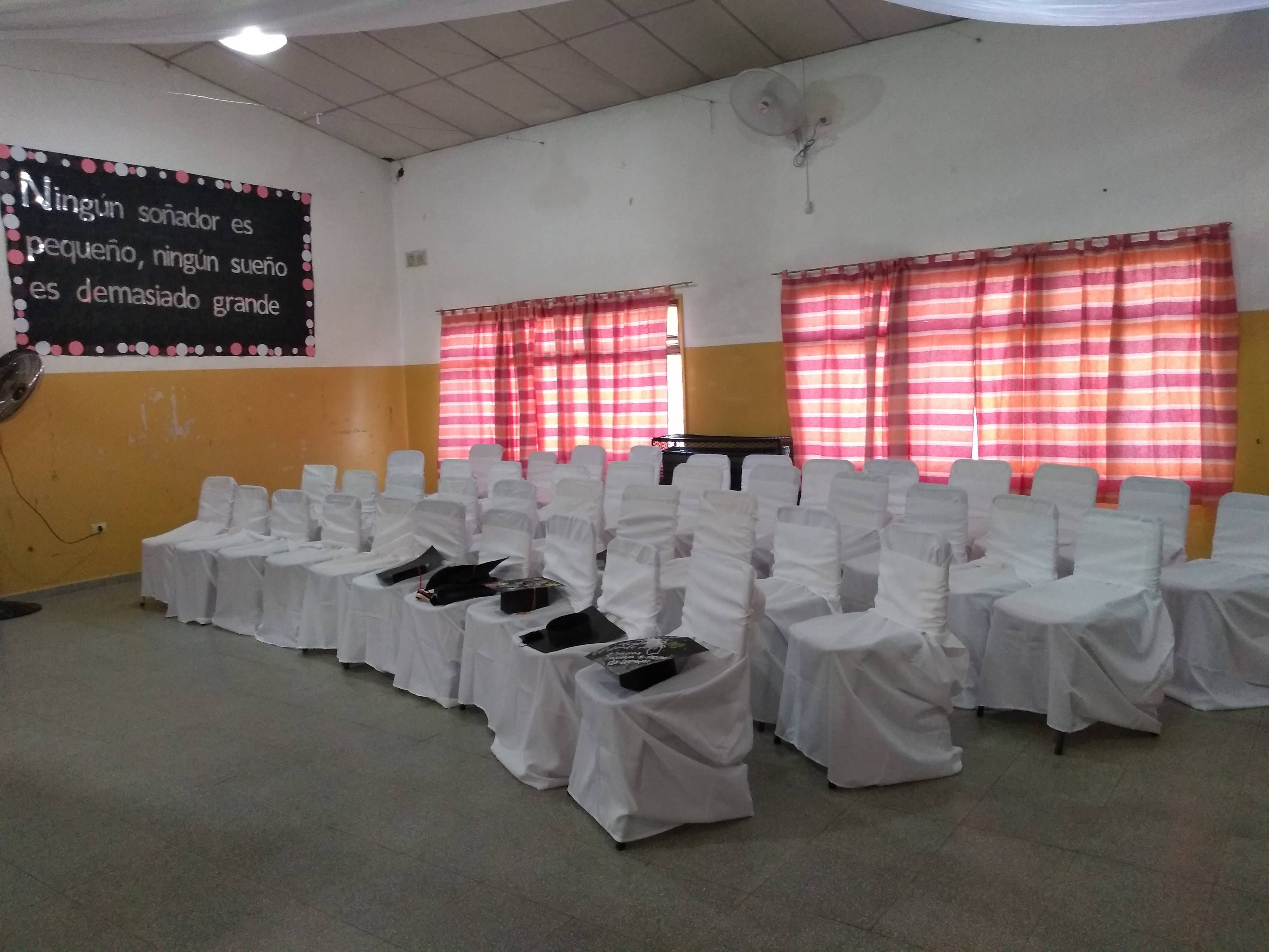 En ésta foto se puede observar el instante previo a iniciar el último acto de egresados realizado en una escuela secundaria, el mismo se realizó en la localidad de General Enrique Godoy, Provincia de Río Negro, República Argentina, escuela ESRN N° 56